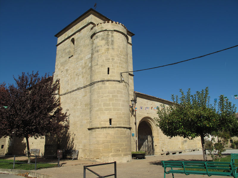 Iglesia de María Magdalena en la localidad de Suzana (Miranda de Ebro, España)